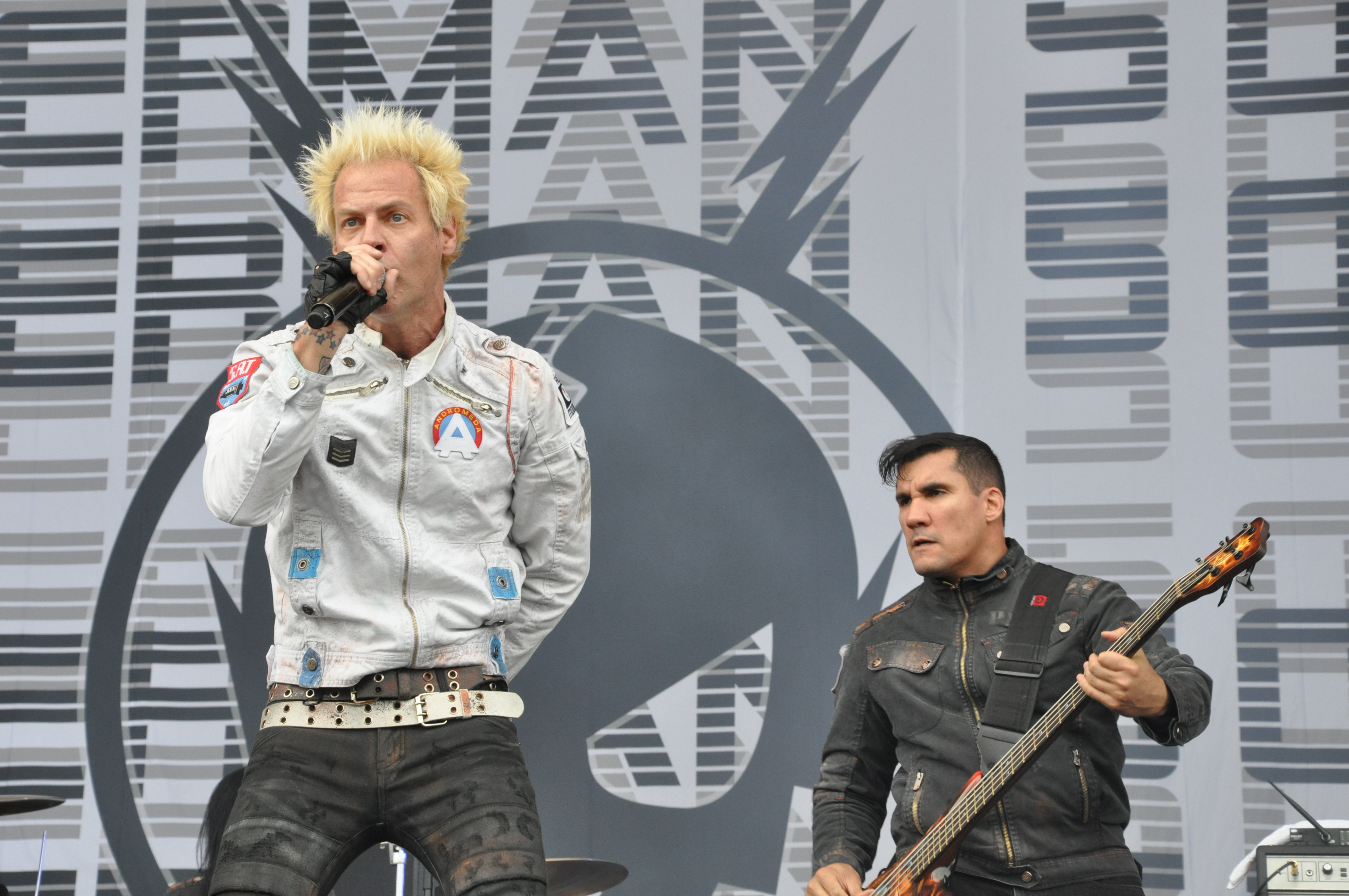 Powerman 5000 auf der Alternastage bei Rock am Ring 2014